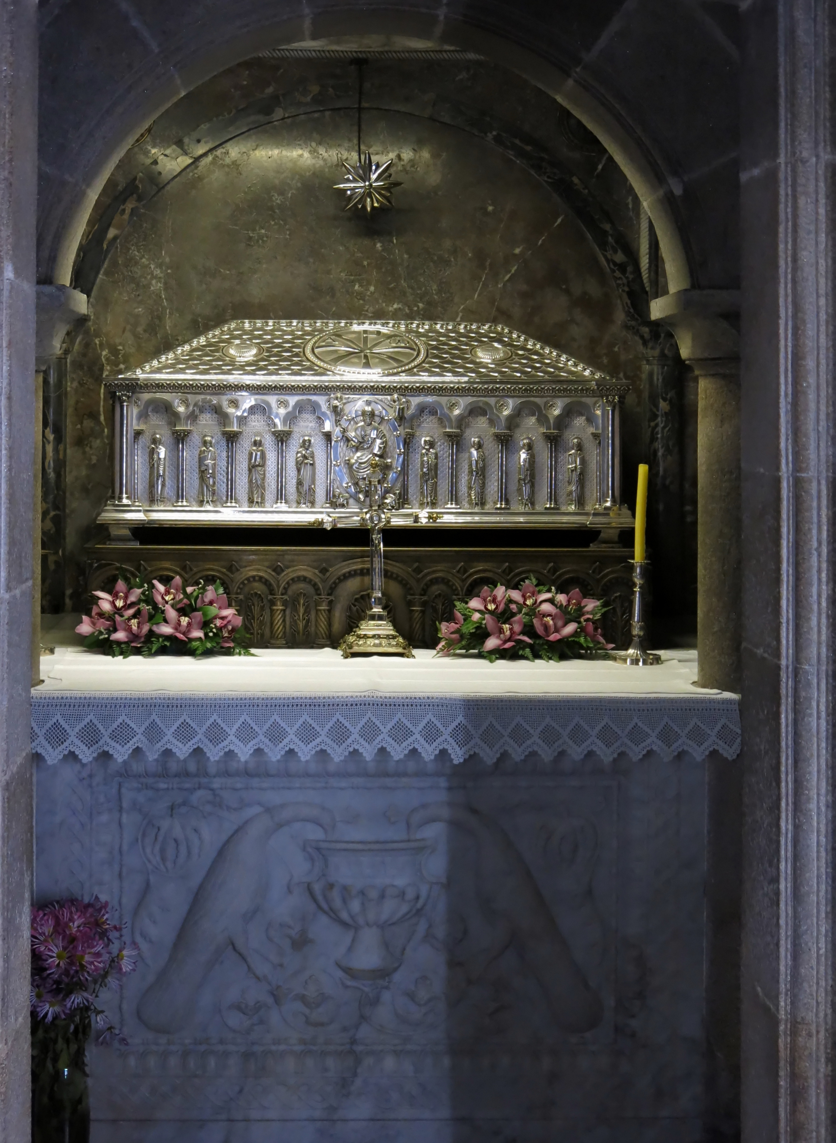 Reliquary of Saint James (Cathedral of Santiago de Compostela)